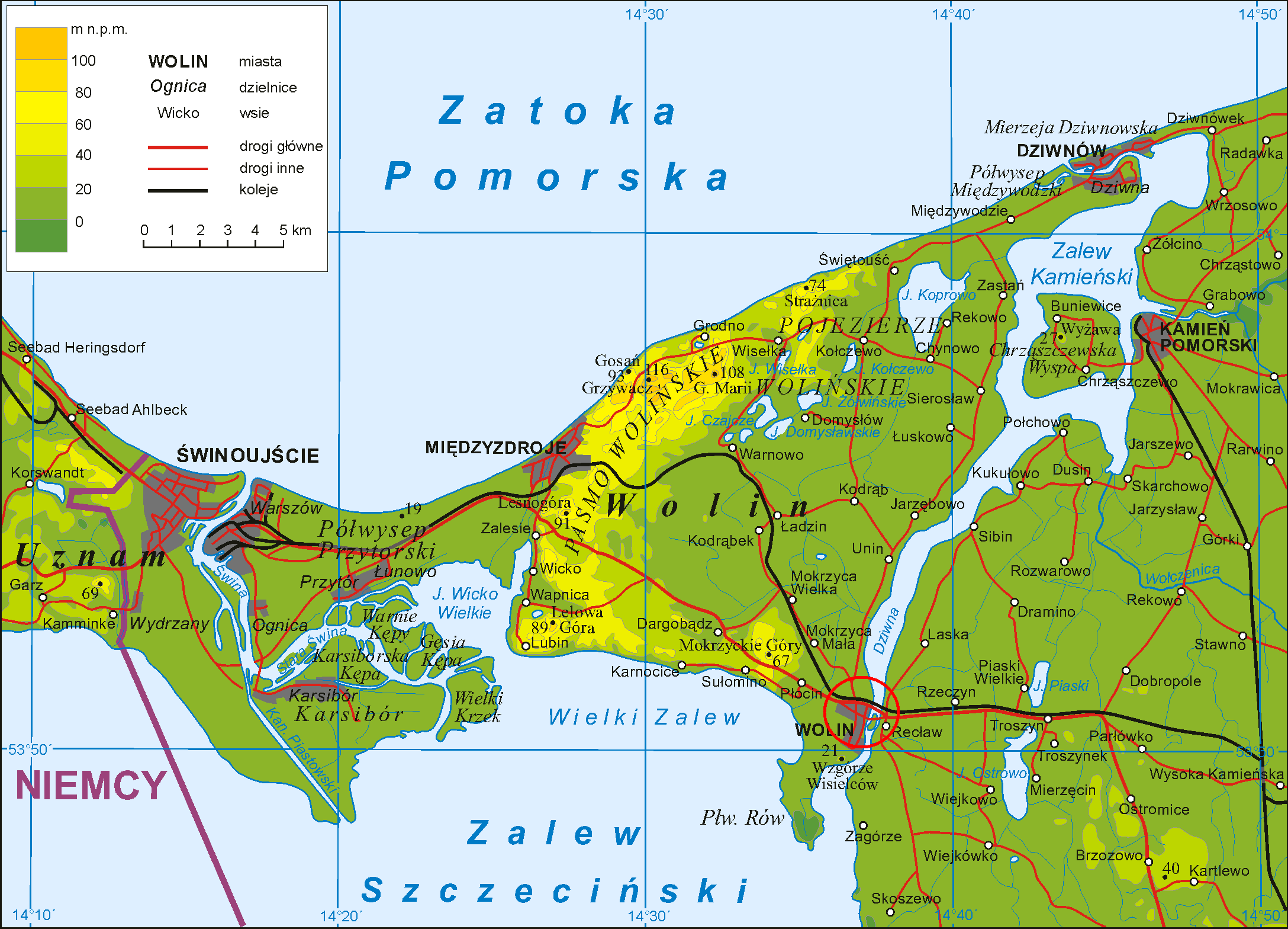 in legend: miasta - towns dzielnice - town's districts wsie - villages drogi główne - main roads drogi inne - other roads koleje - railways Heights in metres Geographic names: Zatoka Pomorska - Bay of Pomerania Zalew Szczeciński - Bay of Szczecin Uznam - Usedom Niemcy - Germany ==